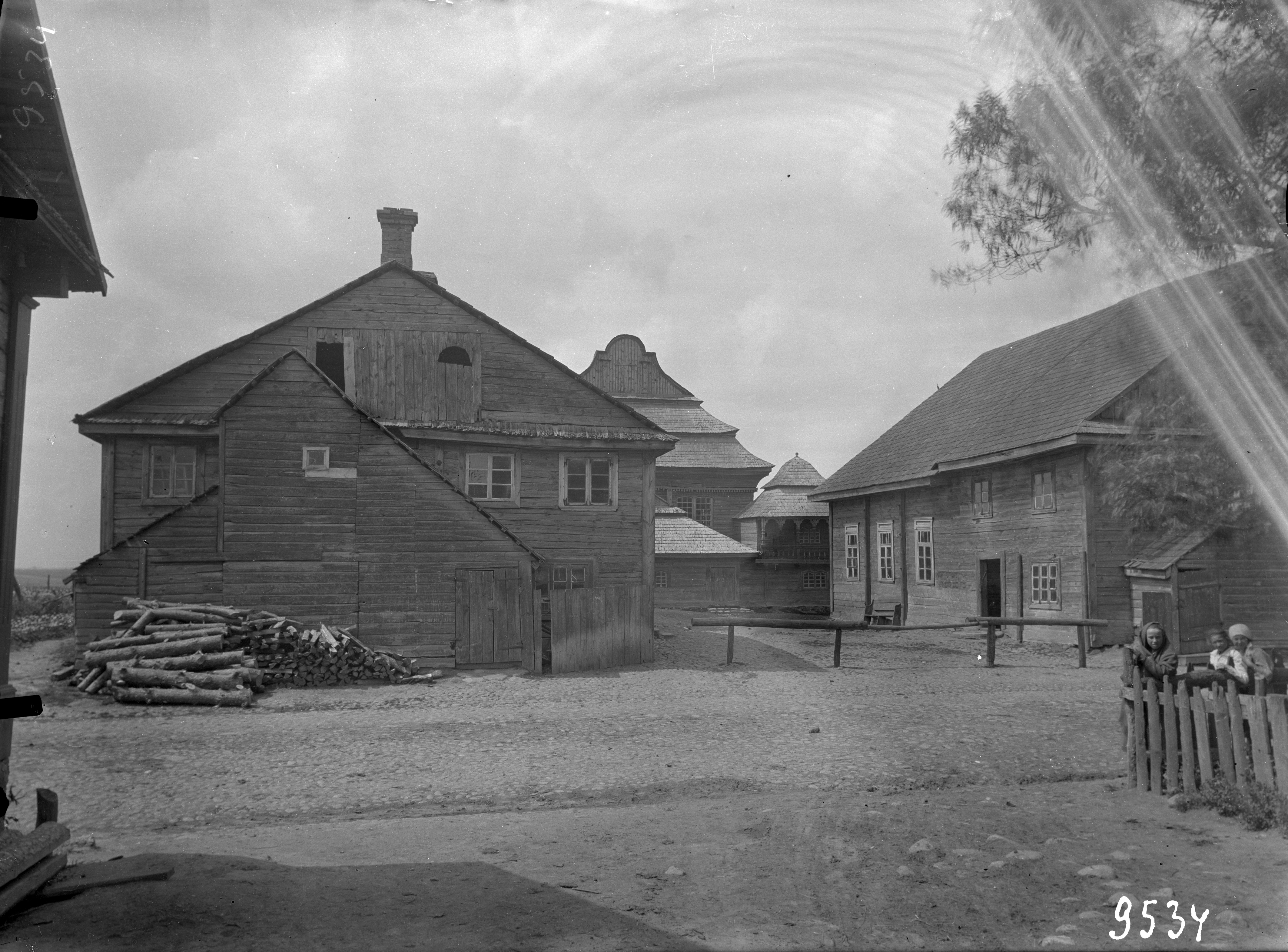 Беларуская (тарашкевіца): Воўпа (Voŭpa)